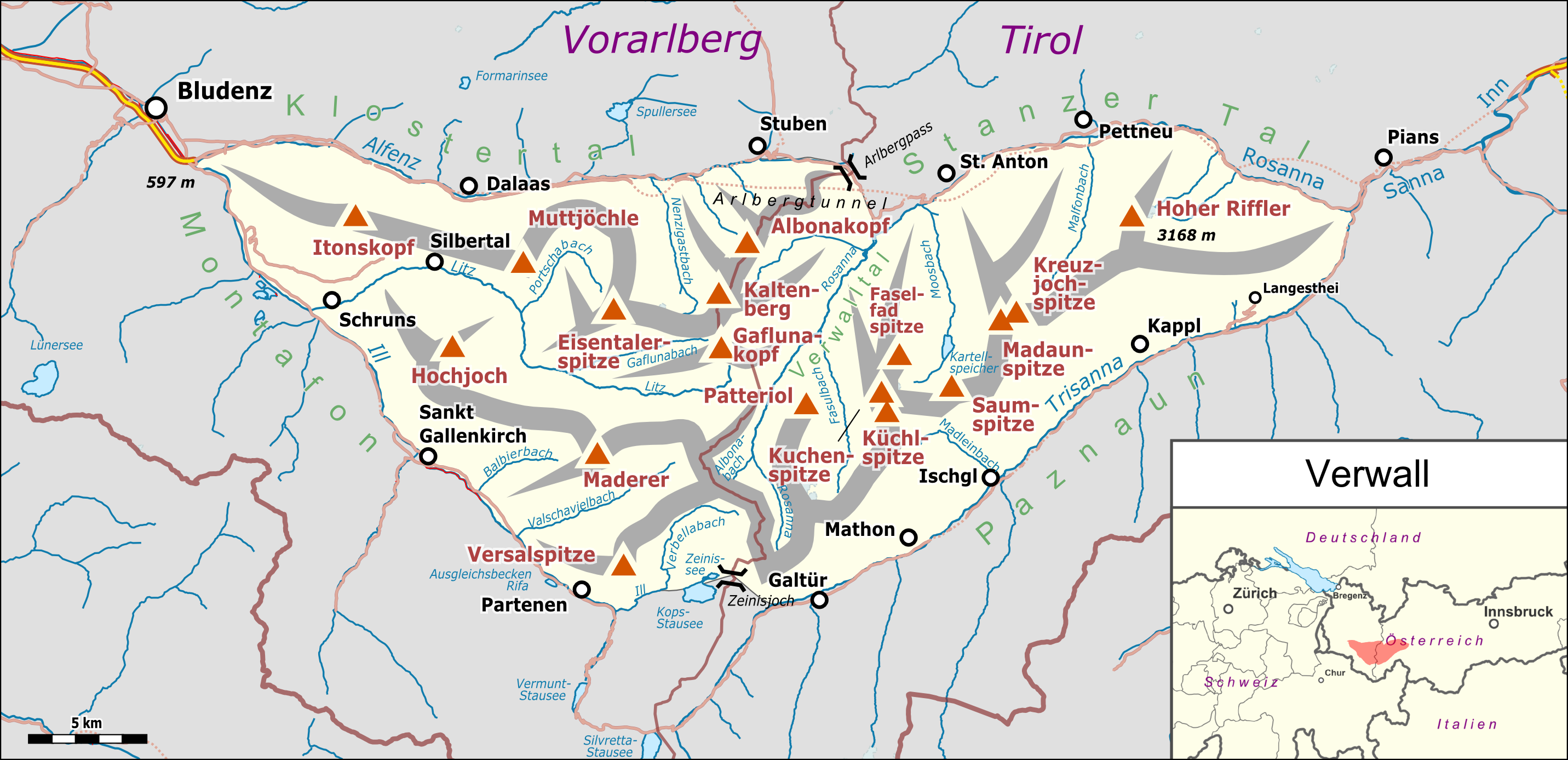 Lagekarte des Verwalls